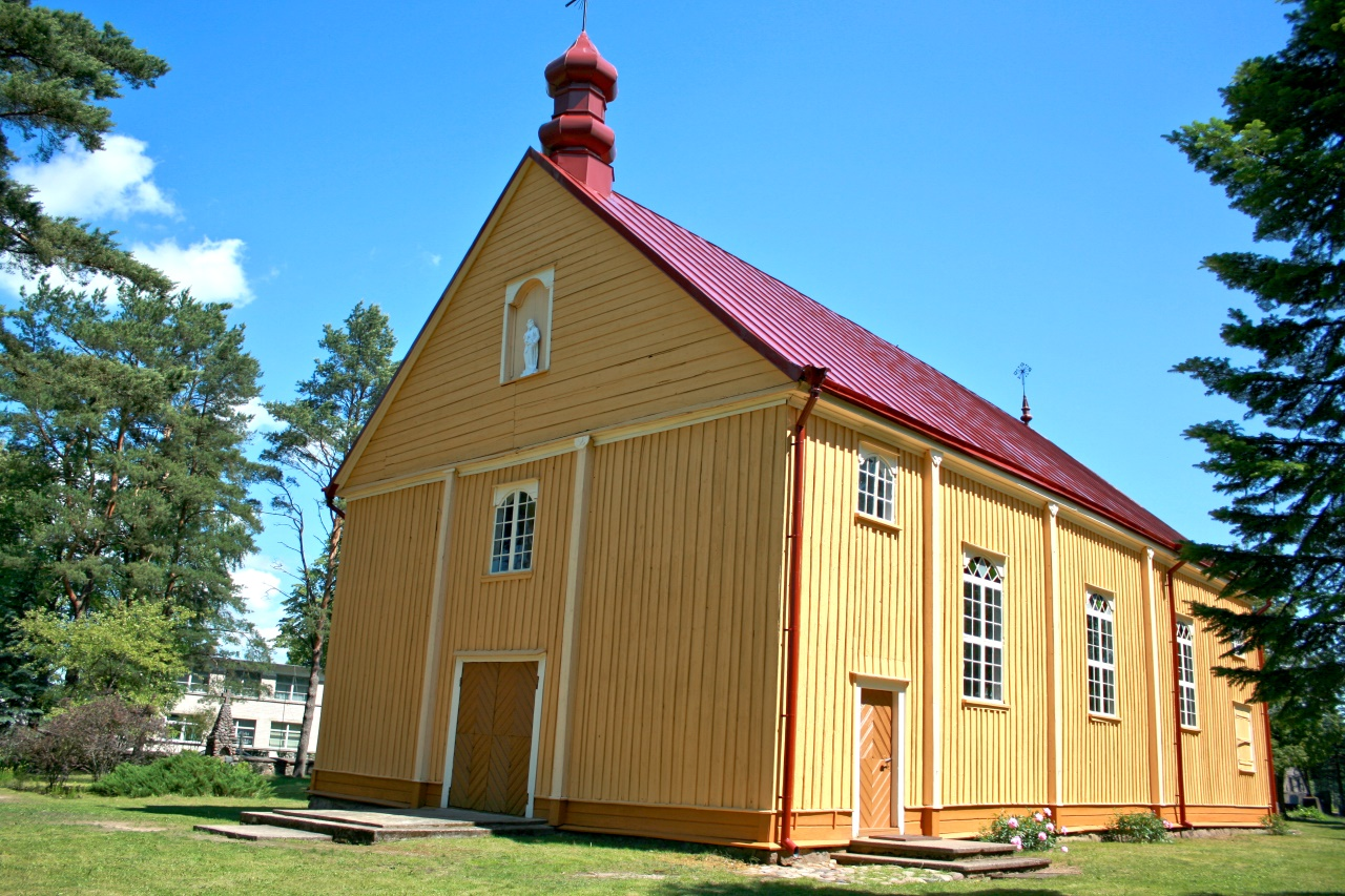 Varlaukio bažnyčia. Šios nuotraukos autorius E. Giedraitis leidžia naudoti nuotrauką be apribojimų, taip pat ir komerciniais tikslais